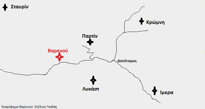 Σκαρίφημα του χωριού Βαρενού του Πόντου και της γύρω περιοχής